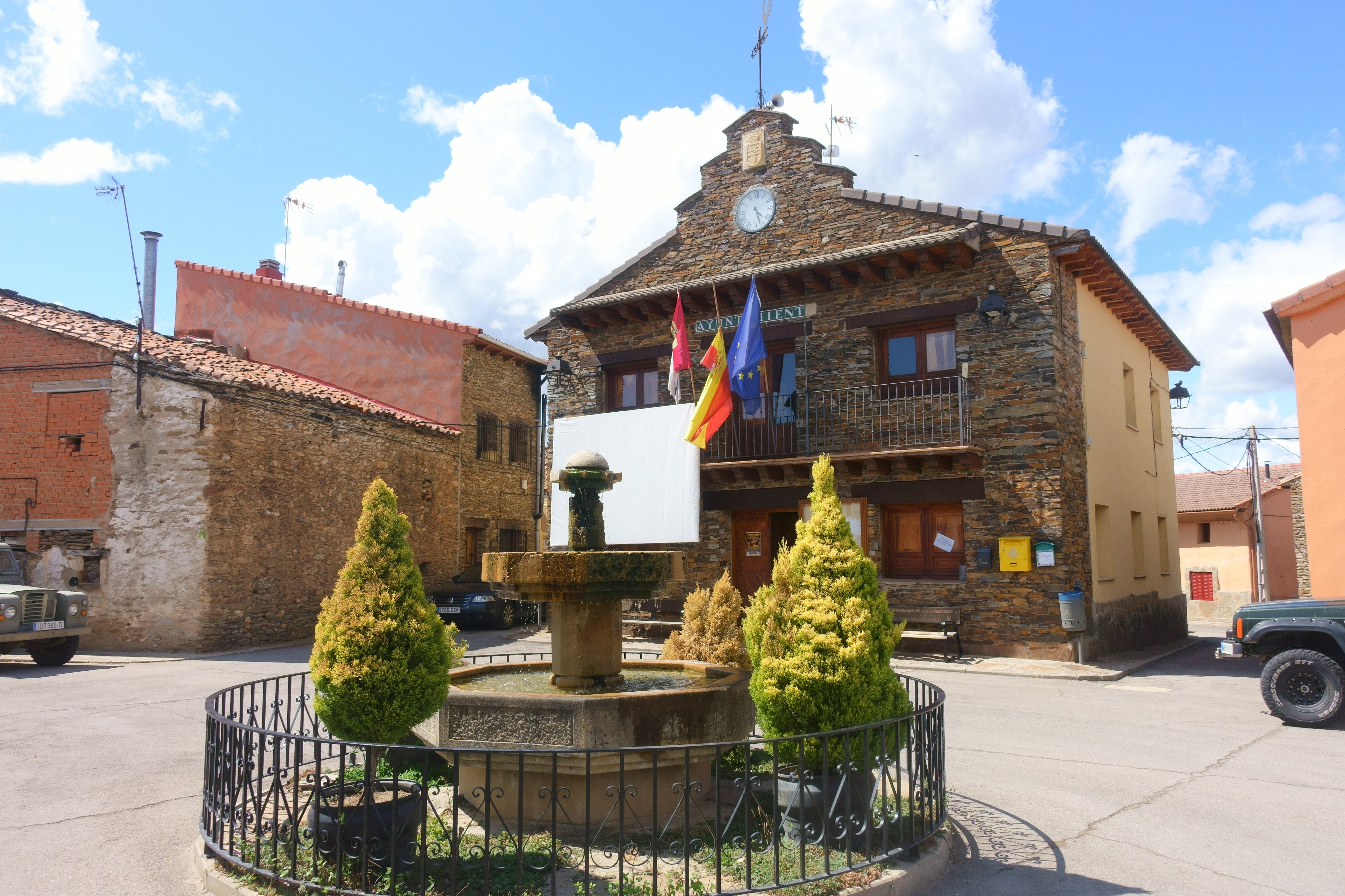 Casa consistorial de Zarzuela de Jadraque (Guadalajara, España).